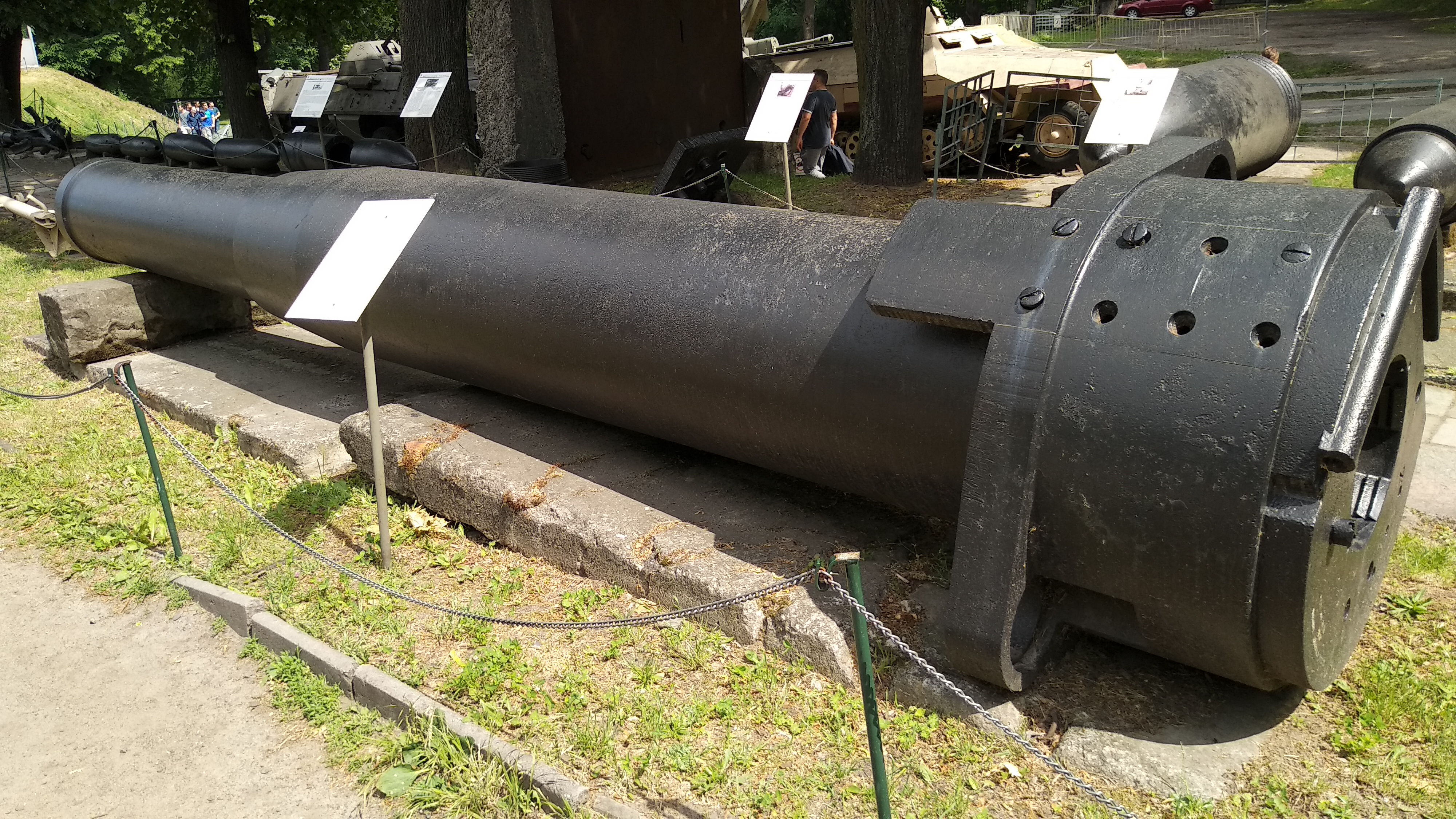 Lufa rosyjskiej haubicy kal. 305 mm wz. 1915, eksponowana w Muzeum Wojska Polskiego w Warszawie.